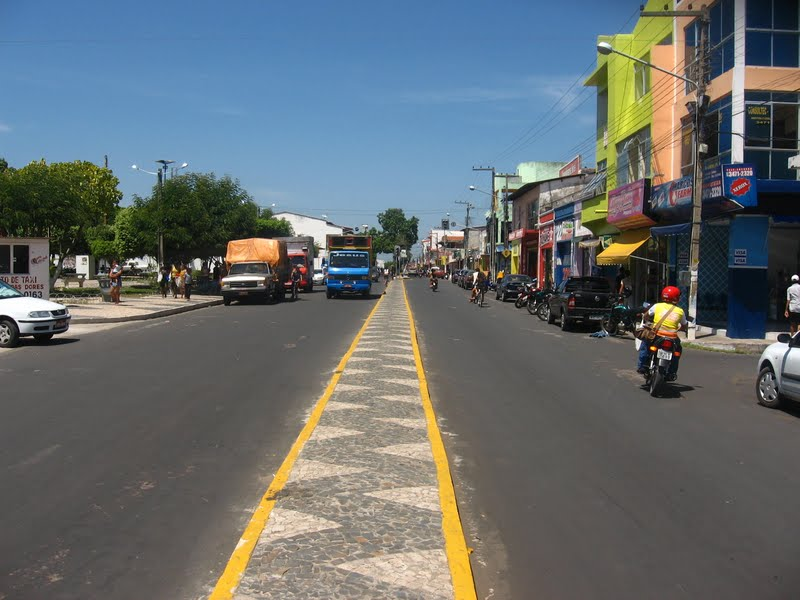 Centro da cidade de Chapadinha, Avenida Oliveira Roma.